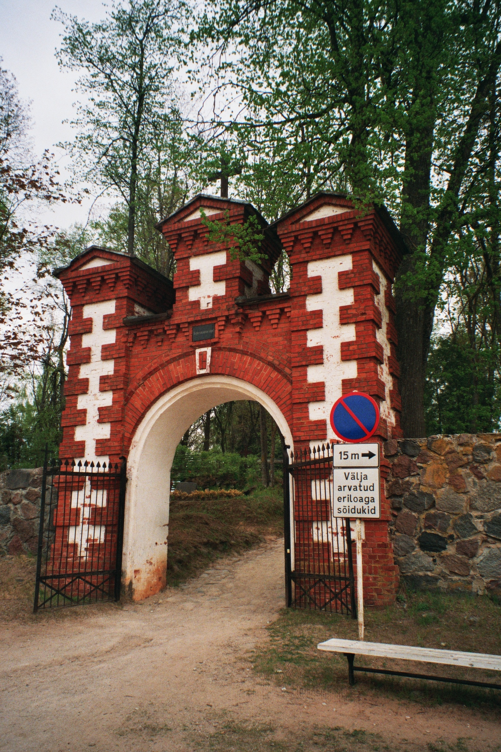 Võro: Põlva kalmuaia väreht